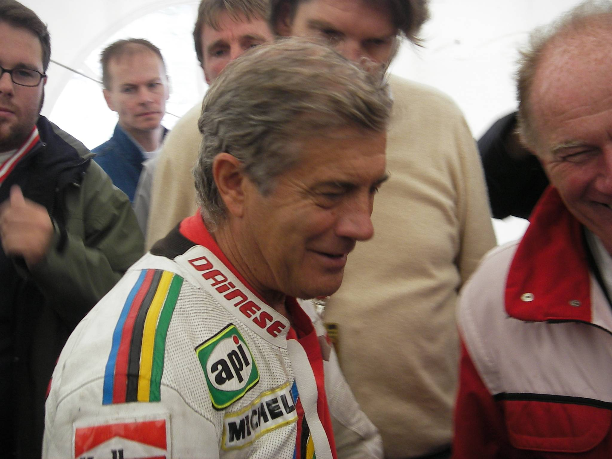 Giacomo Agostini am Salzburgring